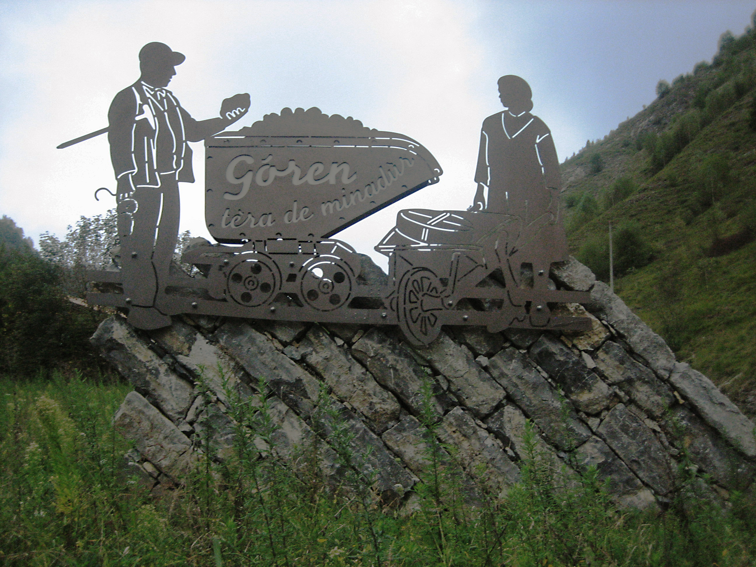 GORNO (BG) - monumento "Gòren - Tèra de minadùr" all'imbocco del paese dedicato al minatore e alla taissina.